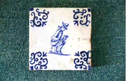 Kaktegel uit de 17de eeuw